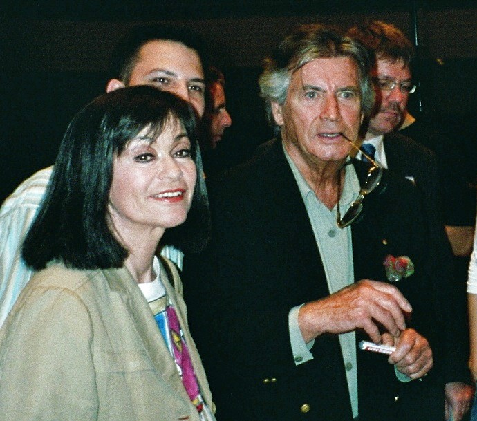 Marie Versini (ehemalige Nscho-tschi) und Pierre Brice (ehemaliger Winnetou) bei einem Musikfest am 30. April 2005 in Luzern